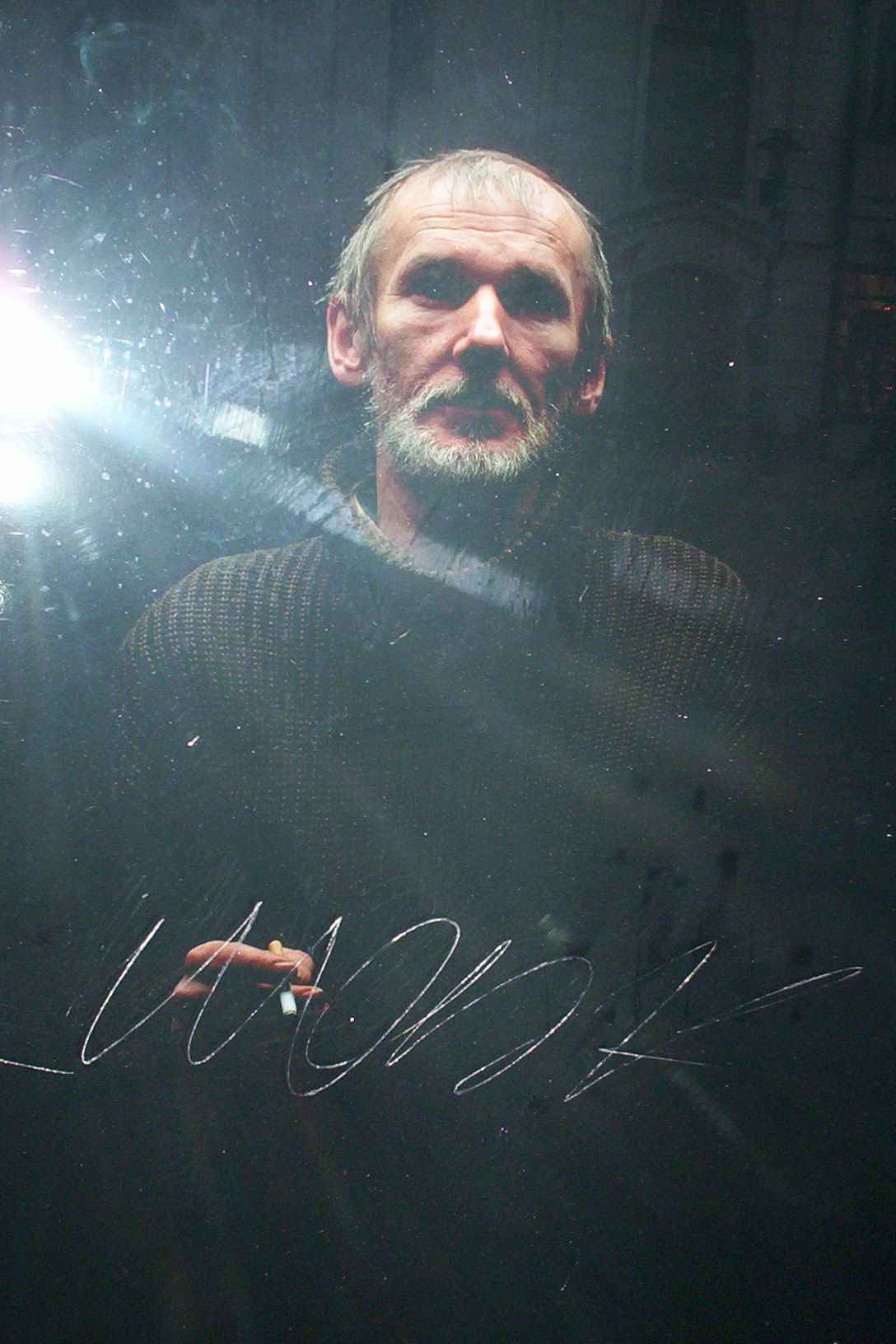 Andrzej Kot